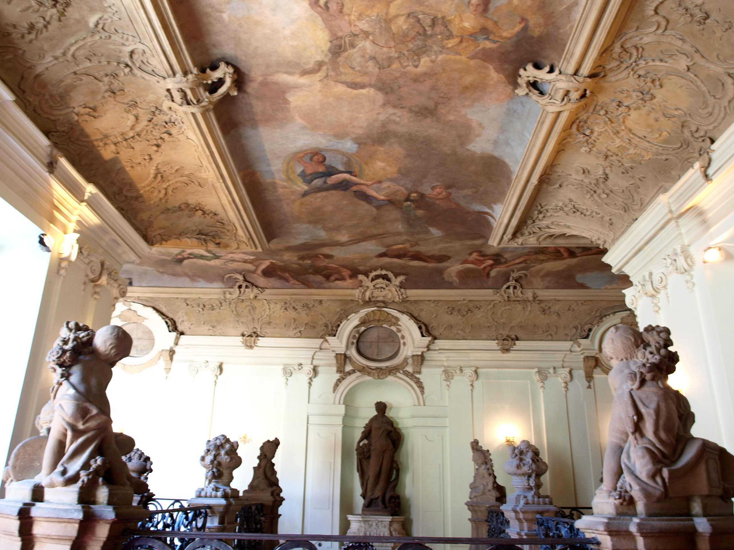 Palác Sylva-Taroucca